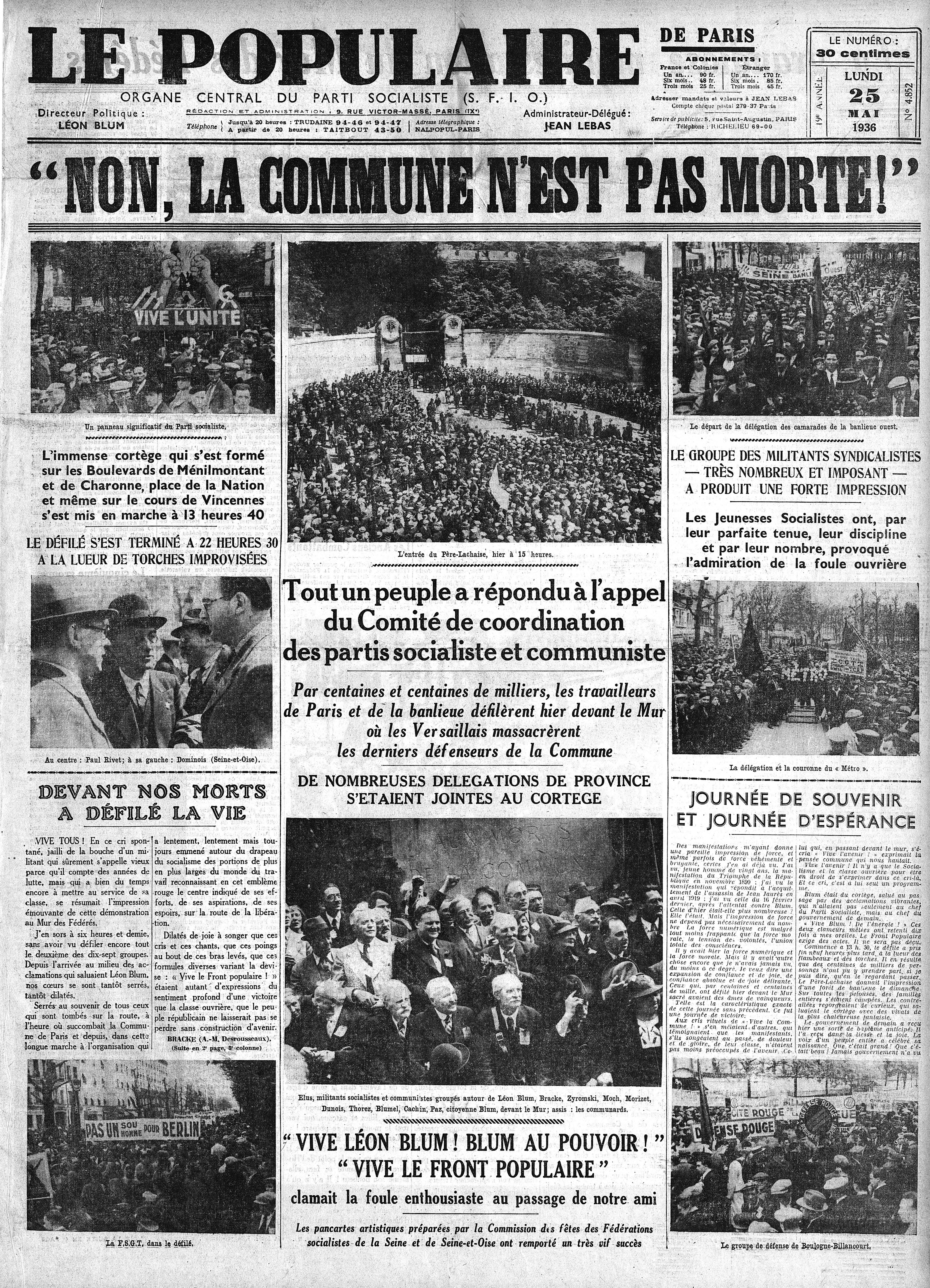 Une du Populaire : non, la Commune n'est pas morte !